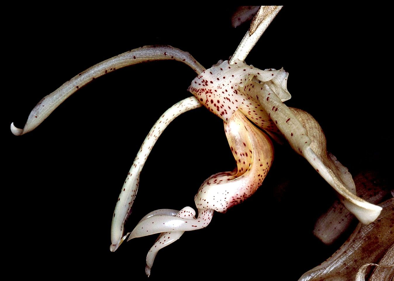 Stanhopea florida